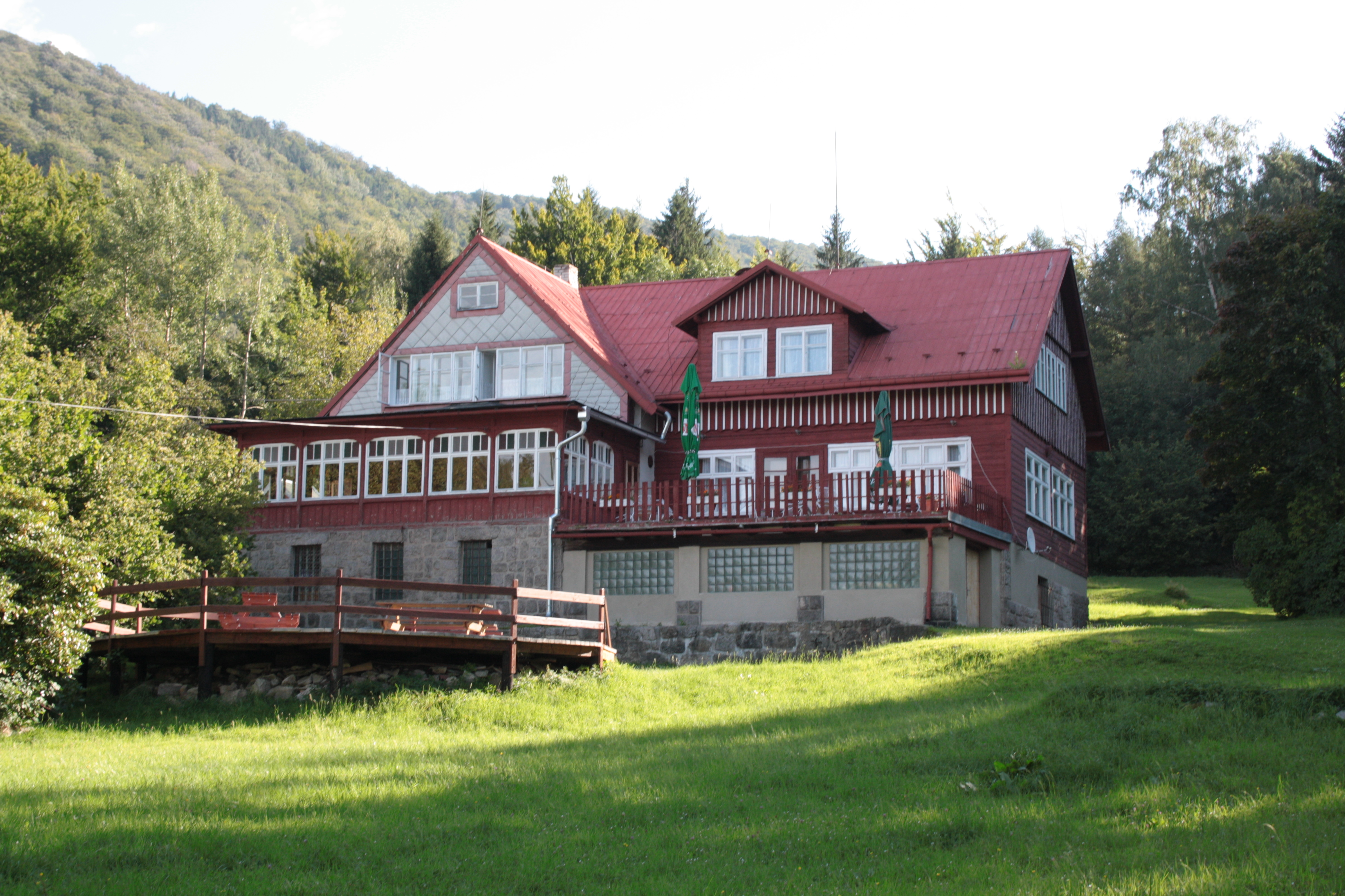 This photograph was taken with a DSLR from WMCZ's Camera grant. Horská chata Bártlova bouda v Bílém Potoce (pohled od jihovýchodu).